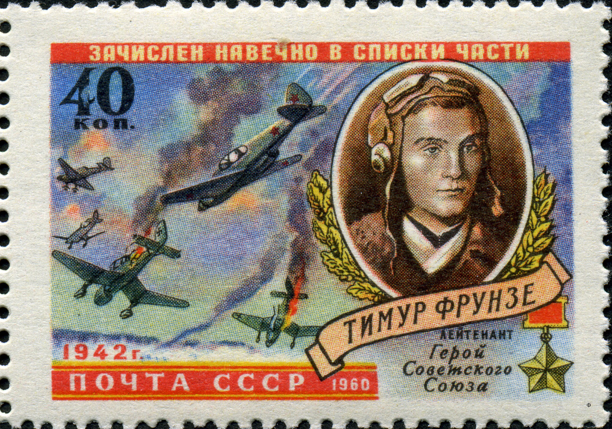 Марка СССР